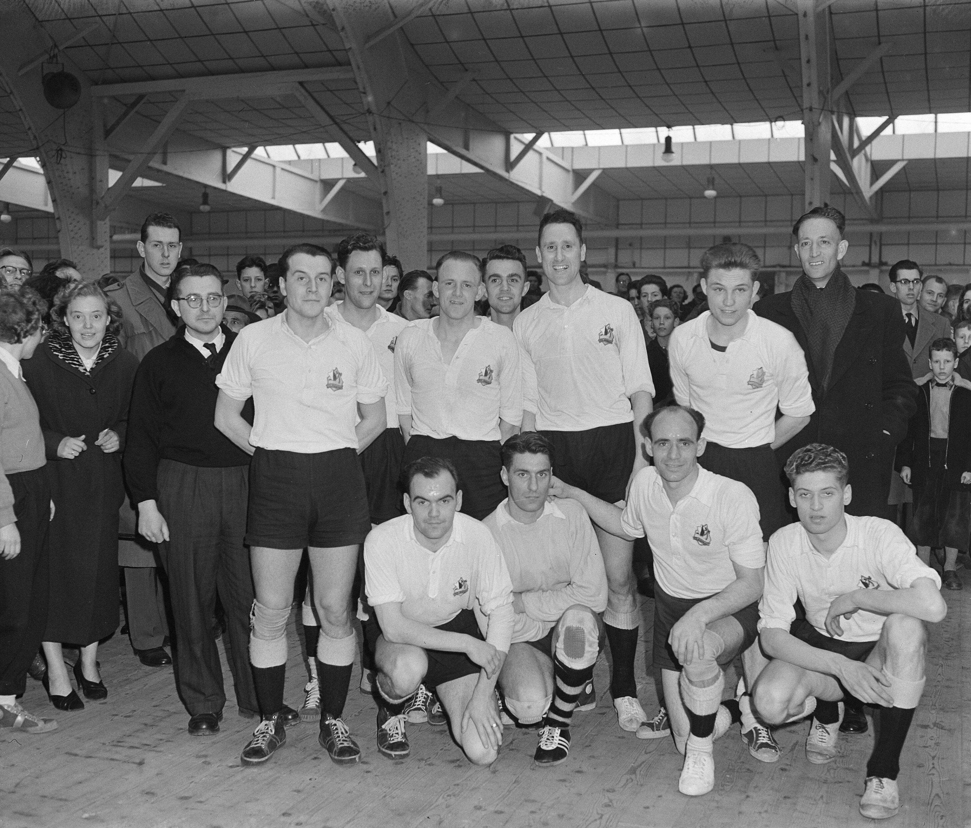 Collectie / Archief : Fotocollectie Anefo Reportage / Serie : [ onbekend ] Beschrijving : Kampioen van Nederland zaalhandbal in Rai Hellas tegen Aalsmeer Datum : 14 maart 1954 Locatie : Amsterdam, Noord-Holland Trefwoorden : Zaalhandbal, kampioen Persoonsnaam : Hellas Instellingsnaam : RAI Fotograaf : Rossem, Wim van / Anefo Auteursrechthebbende : Nationaal Archief Materiaalsoort : Glasnegatief Nummer archiefinventaris : bekijk toegang 2.24.01.09 Bestanddeelnummer : 906-3388